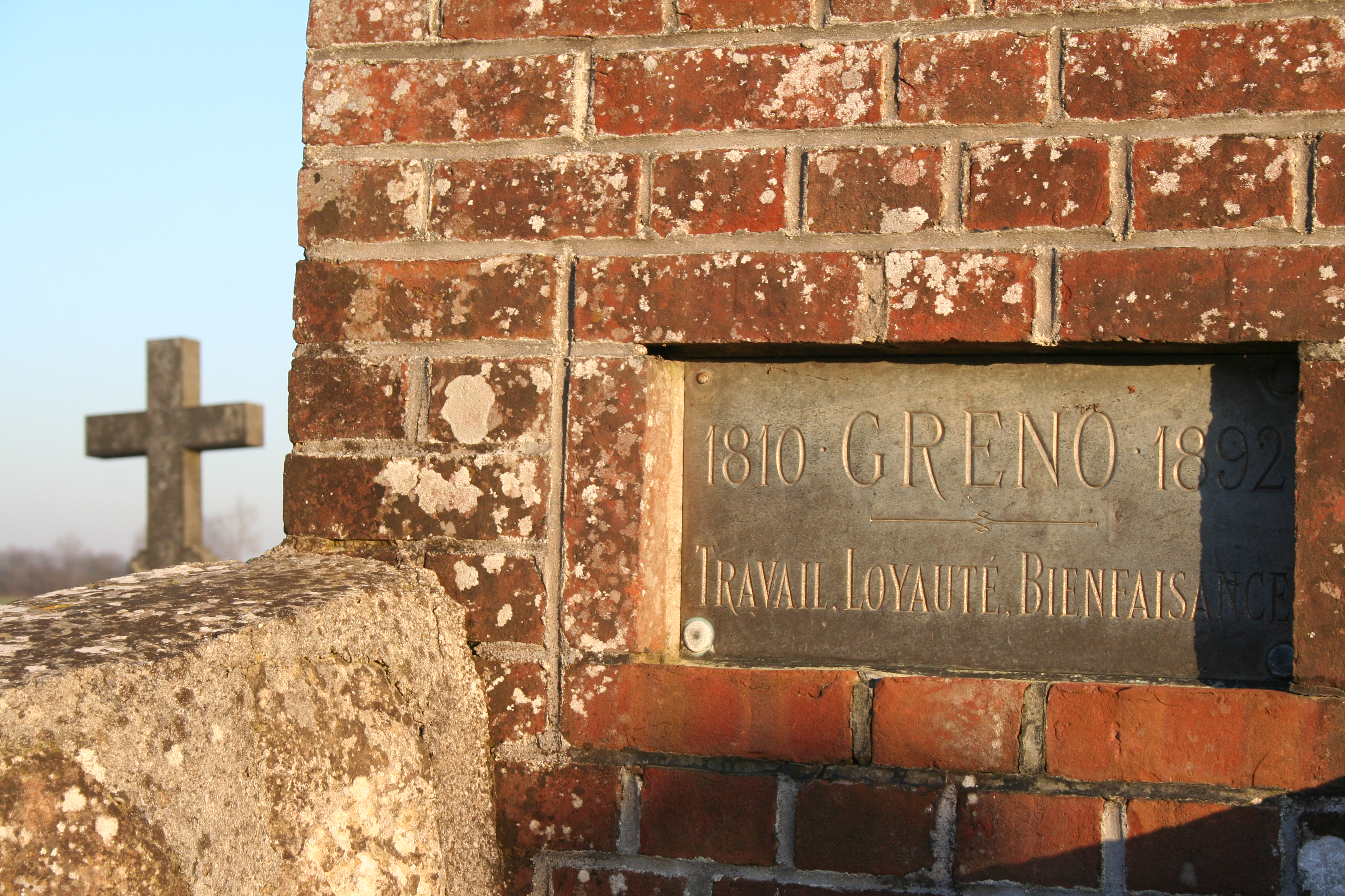 Narcisse Greno's graveyard (detail), in Landouzy-la-ville, France